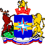 Герб города Шарыпово, Красноярский край